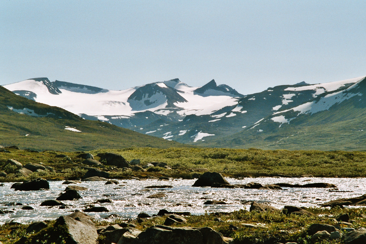 Veotindane in Jotunheimen, Norway.